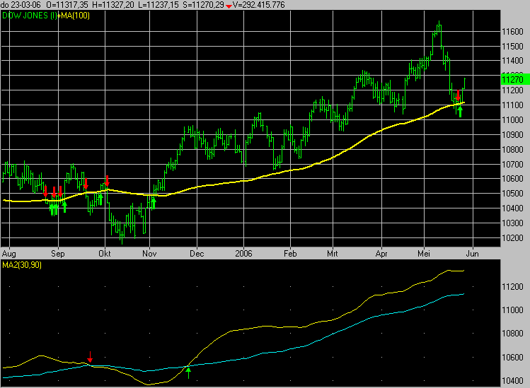 Gemaakt met Wall Street Professional